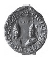 Sigel des Stifts Metelen von 1298